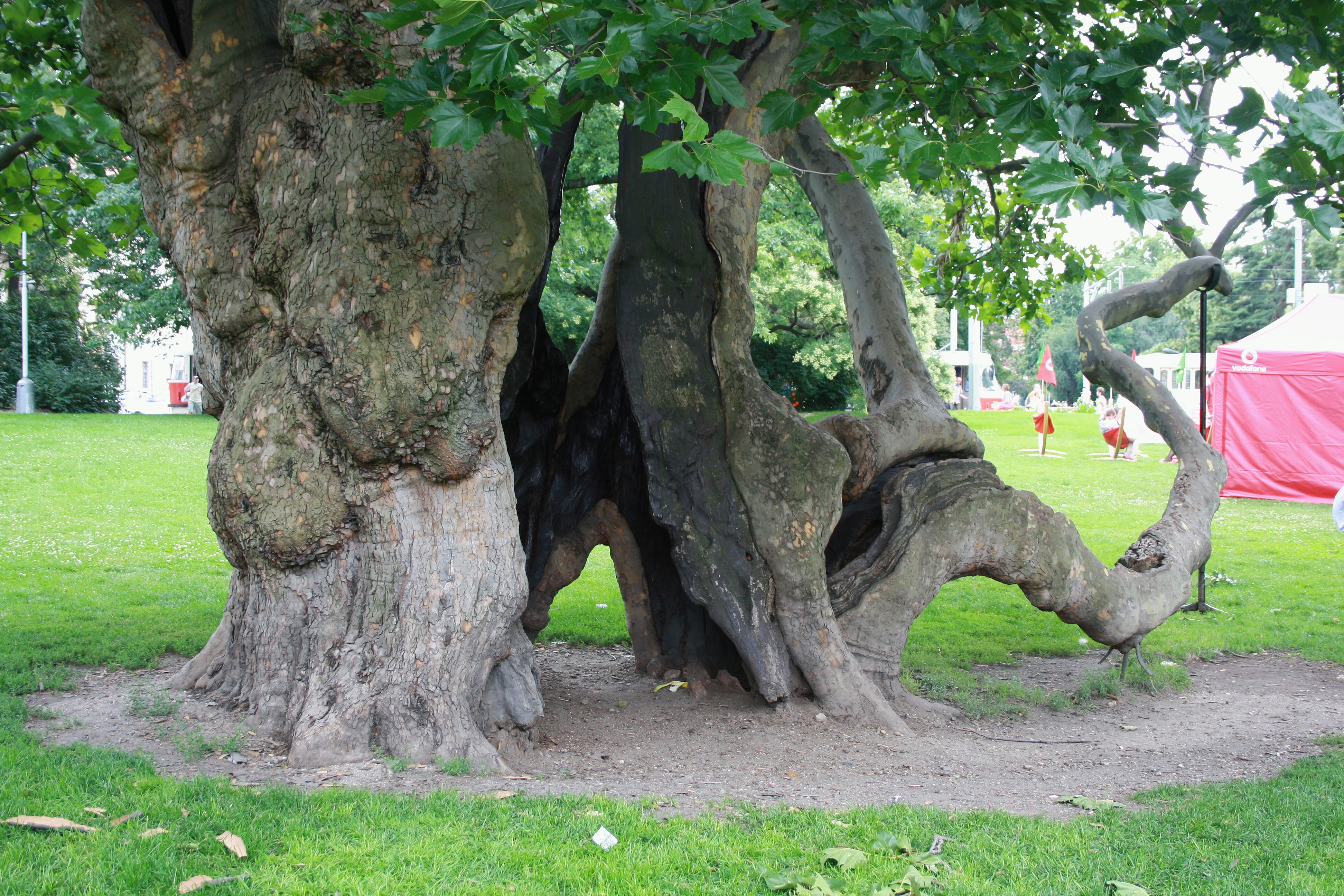 Praha, Nové Město - památný platan na Karlově náměstí